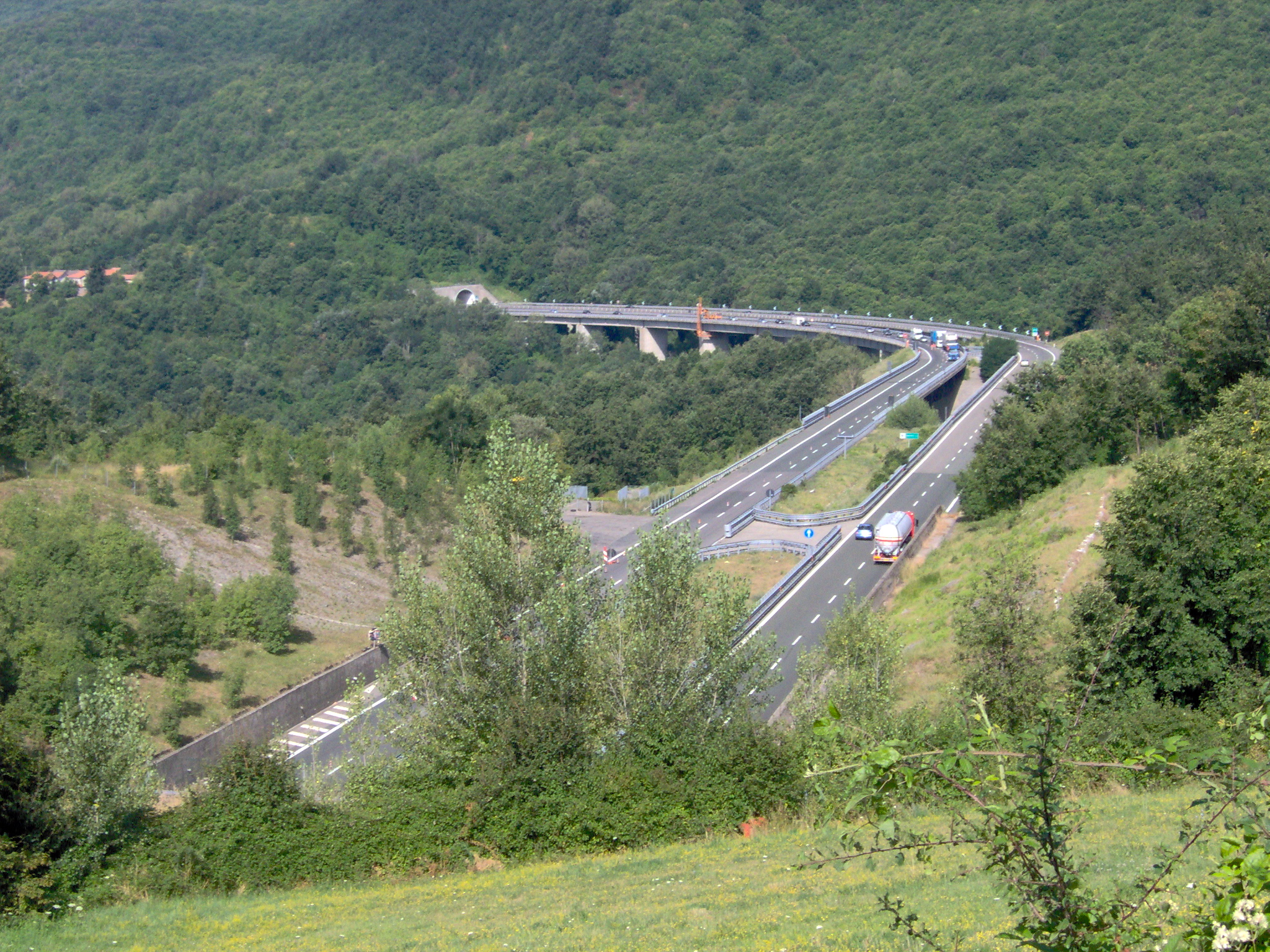 Berceto vista dalla SS.62 della Cisa in località Poggio